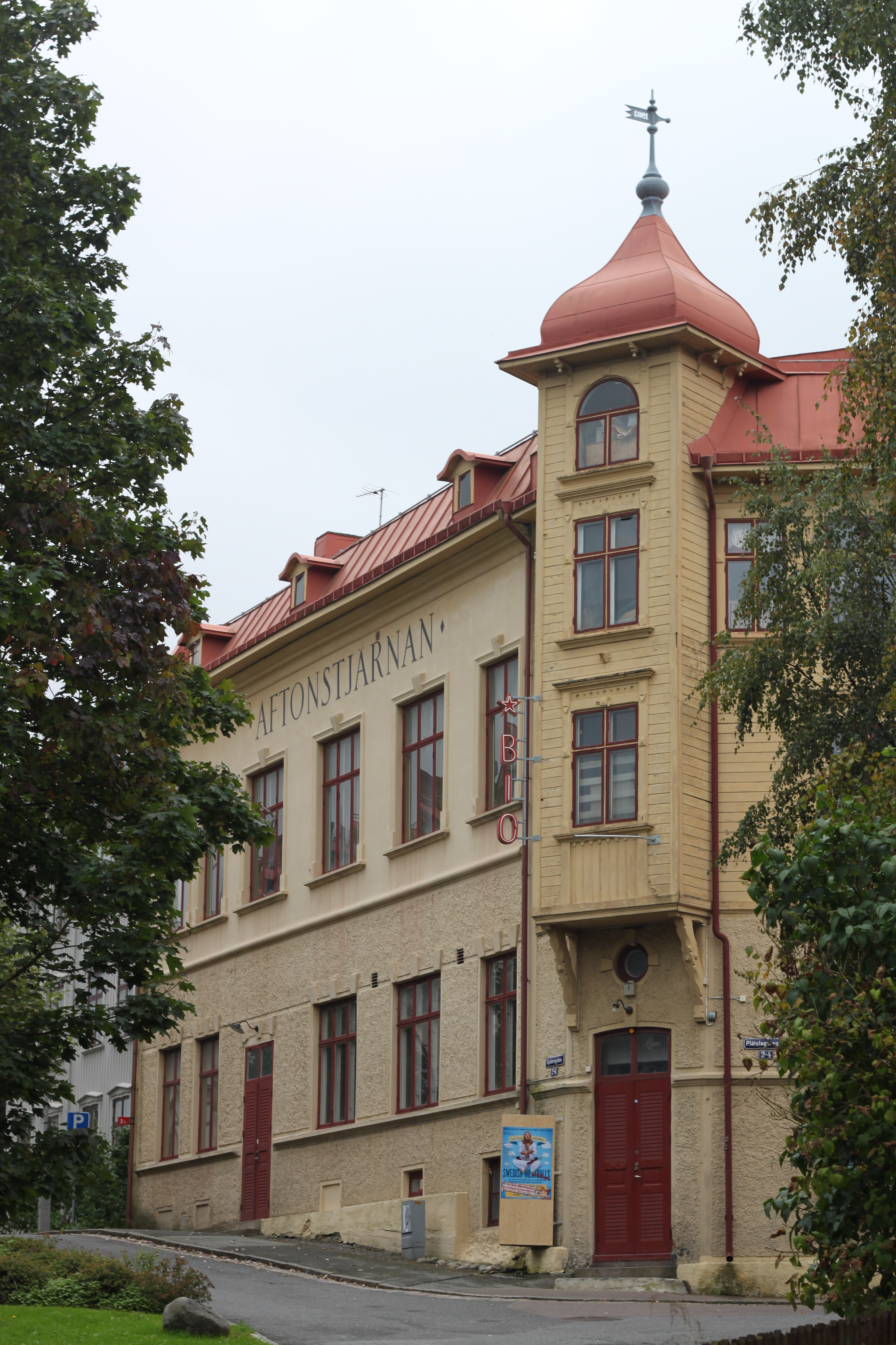 Föreningshuset Aftonstjärnan i korsningen Gjutaregatan-Plåtslagaregatan i landshövdingekvarteren på Lindholmen, Göteborg, Västra Götalands län, Sverige.